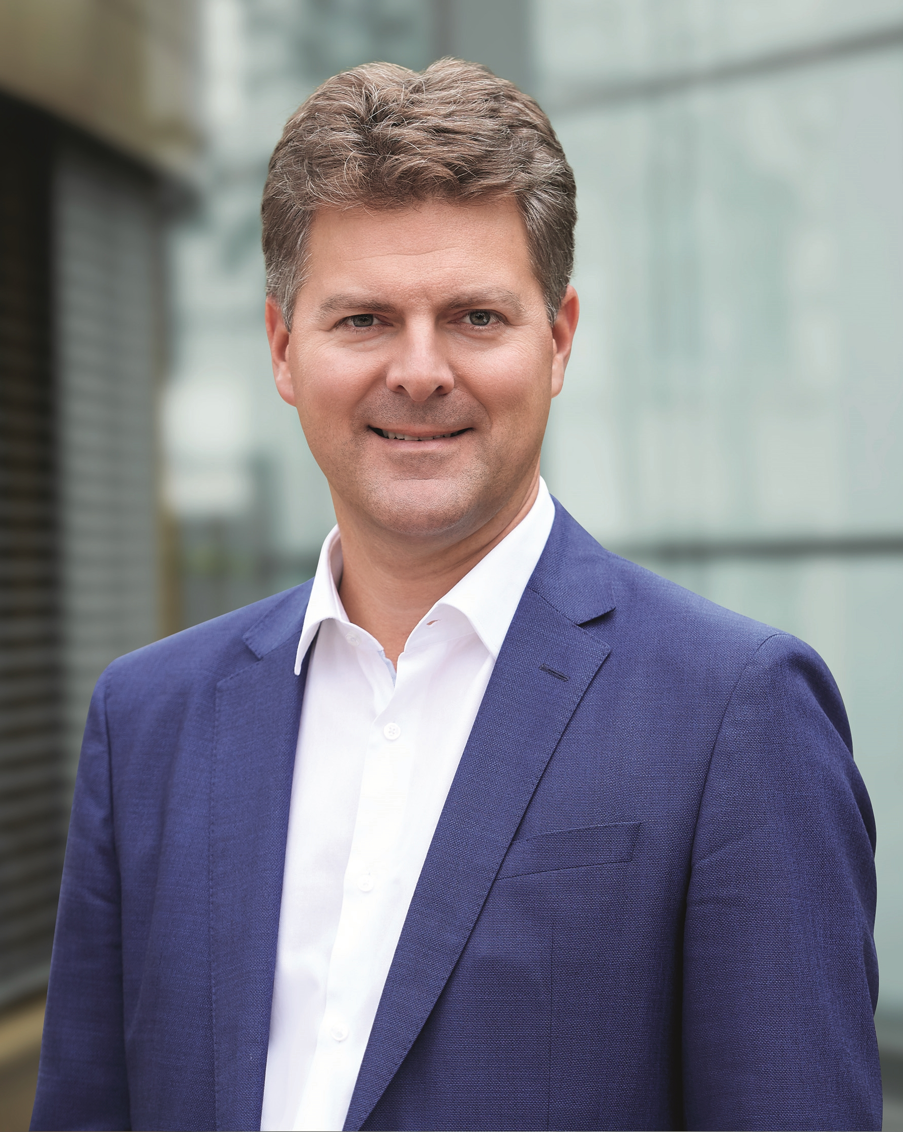 Foto von Andreas Schwab, September 2018